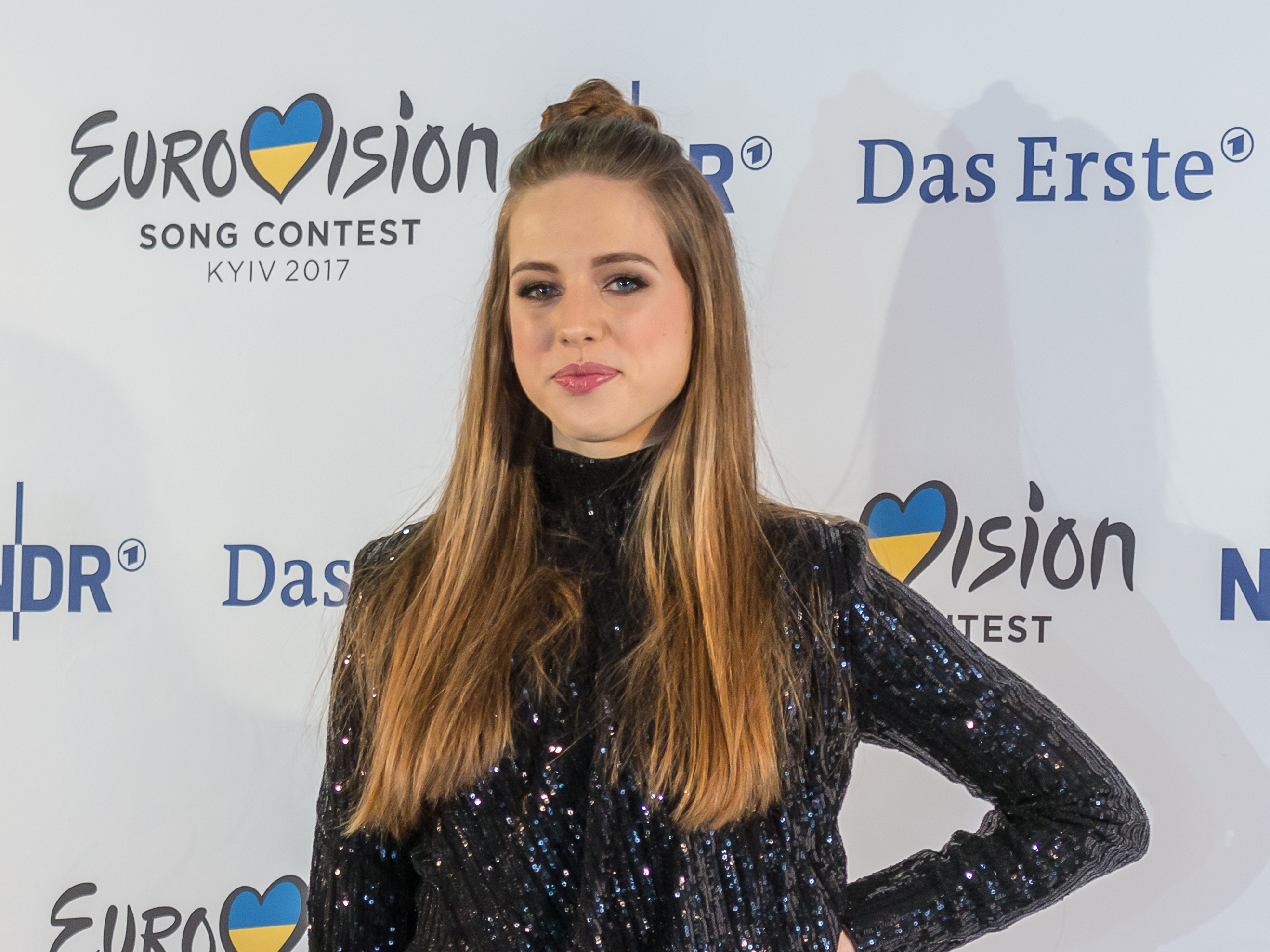 Unser Song 2017 - Pressekonferenz am Probentag: Felicia Lu Kürbiß